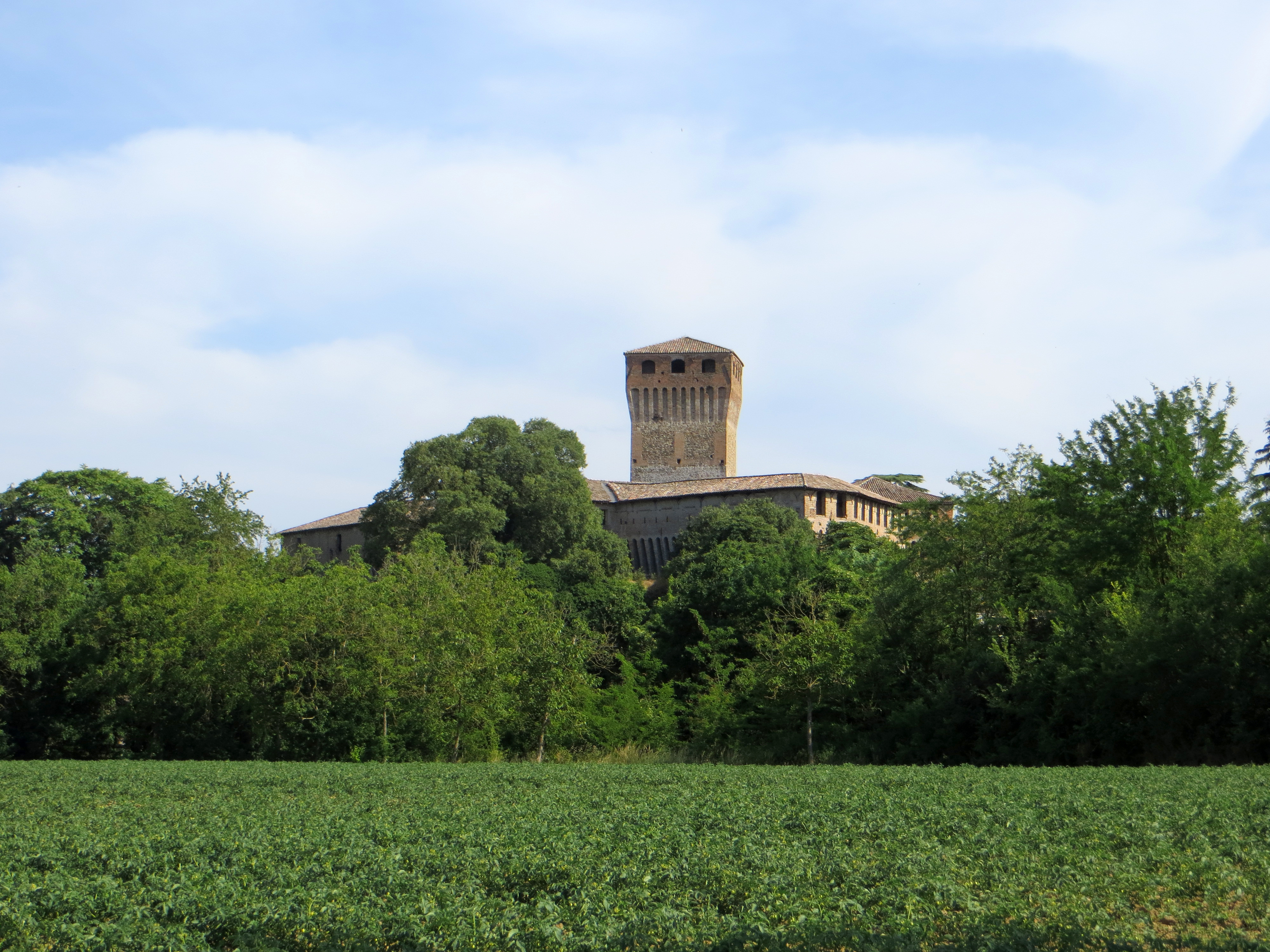 Castello (Montechiarugolo) - panorama da nord-ovest